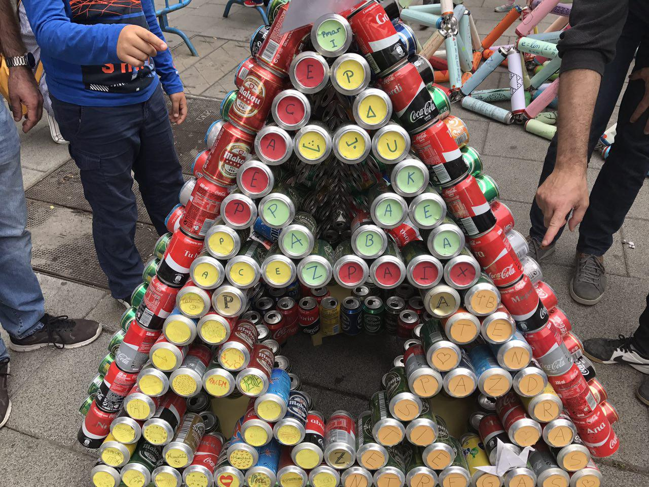 Integrantes de la Sociedad Madrileña de Profesores de Matemáticas ‘Emma Castelnuovo’, en colaboración con la Junta Municipal de Chamberí, llevaron a cabo el experimento “Matemáticas en la calle” el pasado domingo 21 de mayo en la calle Fuencarral.